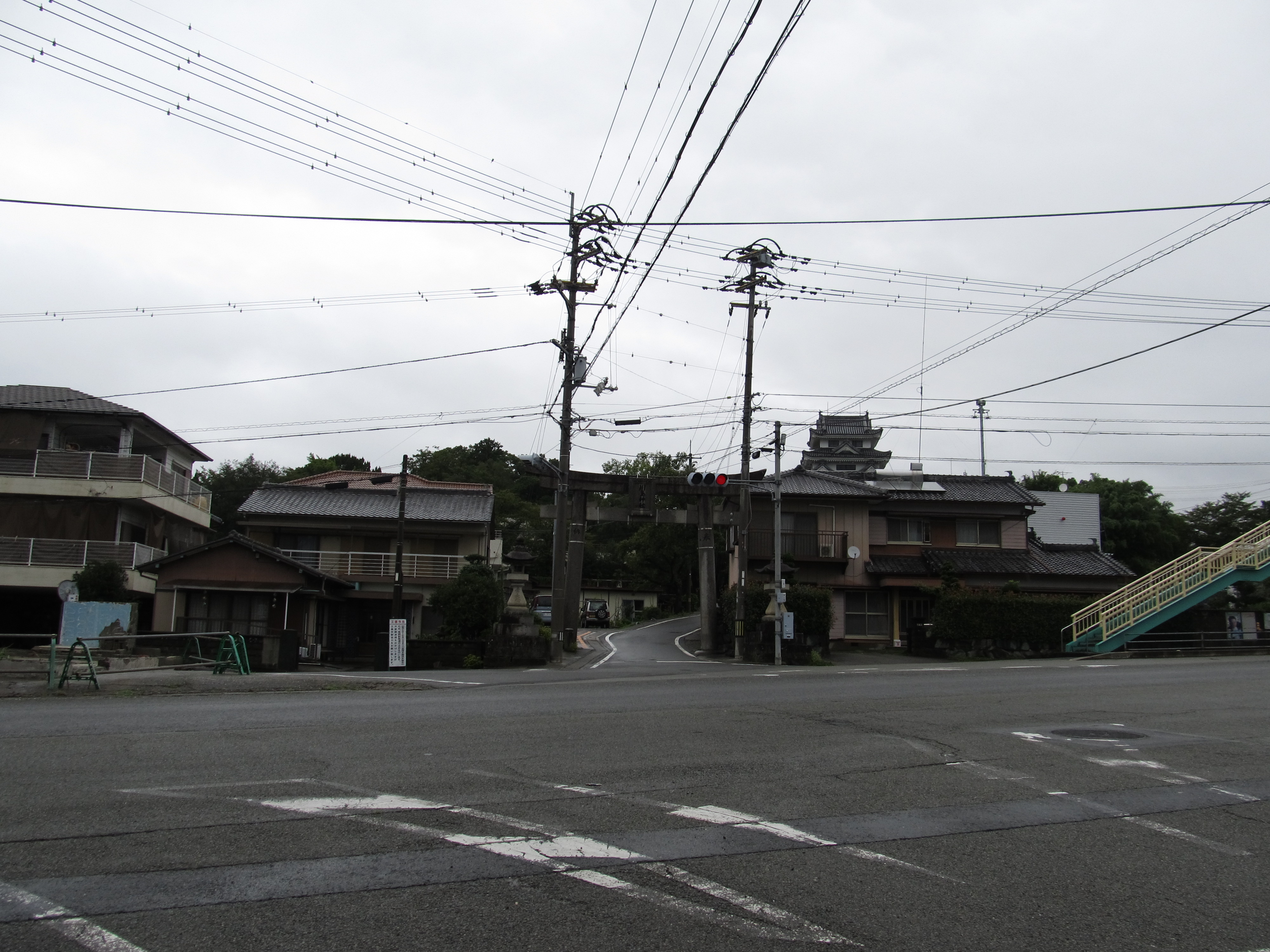 徳島県吉野川市川島町にある国道192号城山交差点。 香川県道・徳島県道2号津田川島線、徳島県道156号阿波川島停車場線はここが終点。